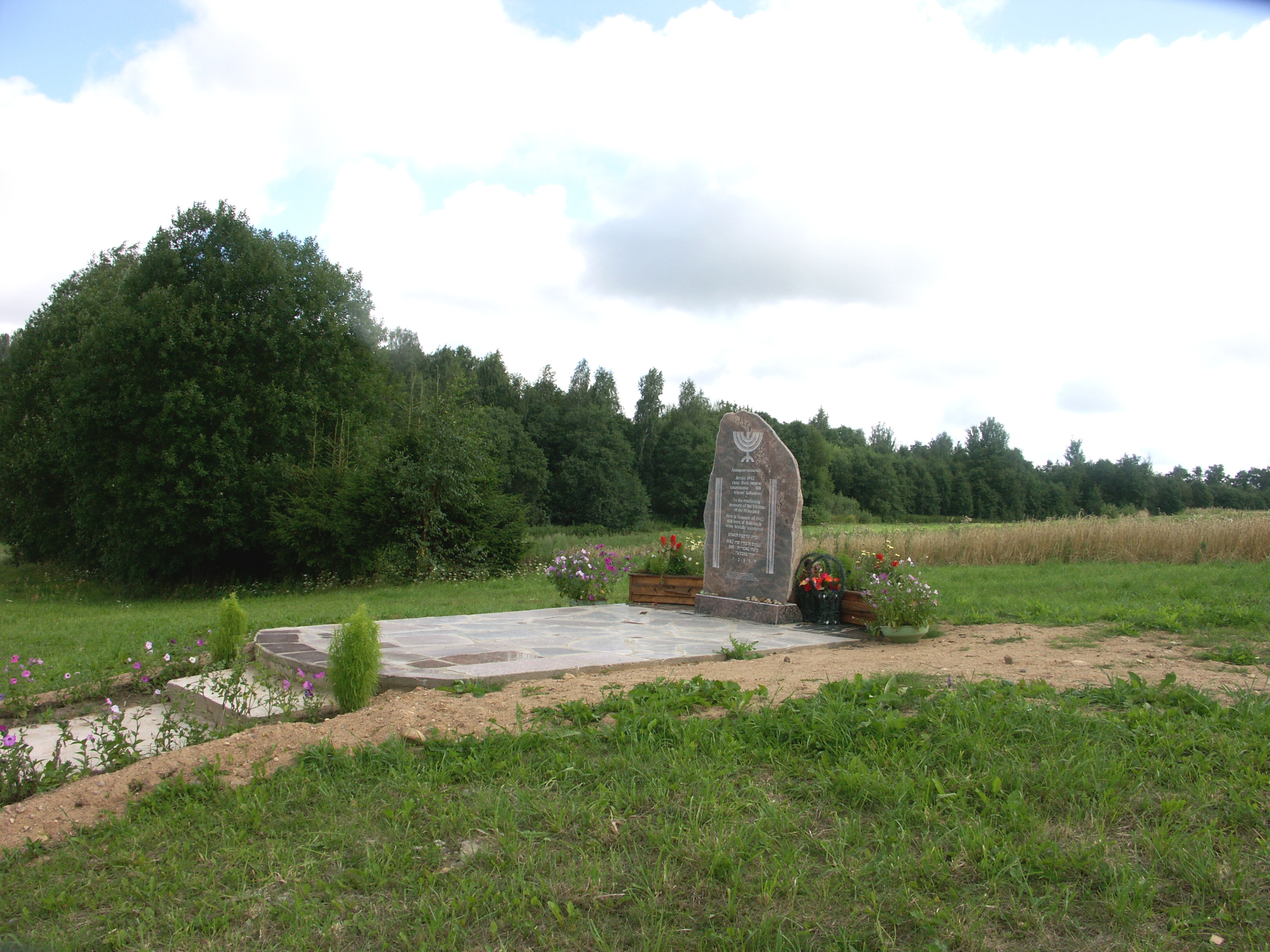 Бобыничи, Полоцкий район. Памятник убитым в 1942 году евреям - узникам Бобыничского гетто.